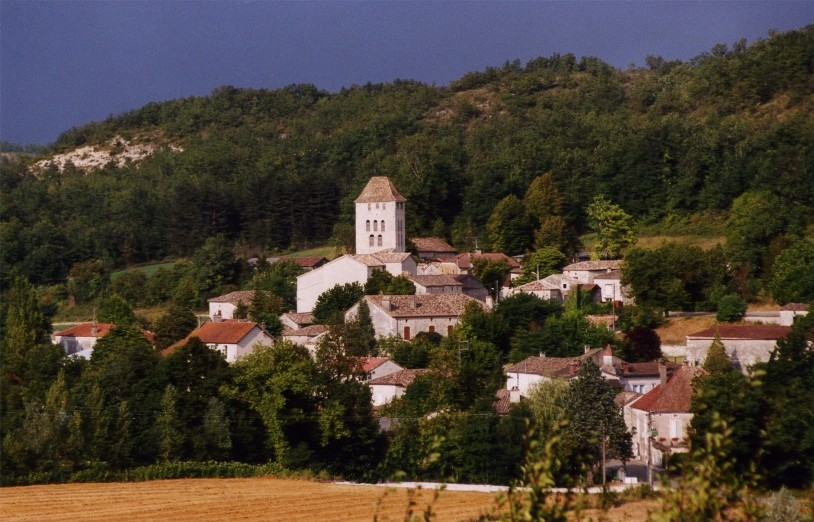 Village de St Pantaléon Lot